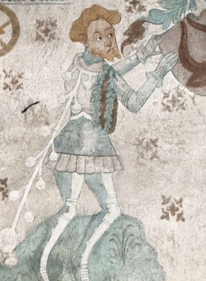 Valvmålning i Tensta kyrka av Johannes Rosenrod, föreställande kyrkans patronus som förmodligen bekostade valvmålnigen Bengt Jönsson Oxenstierna.